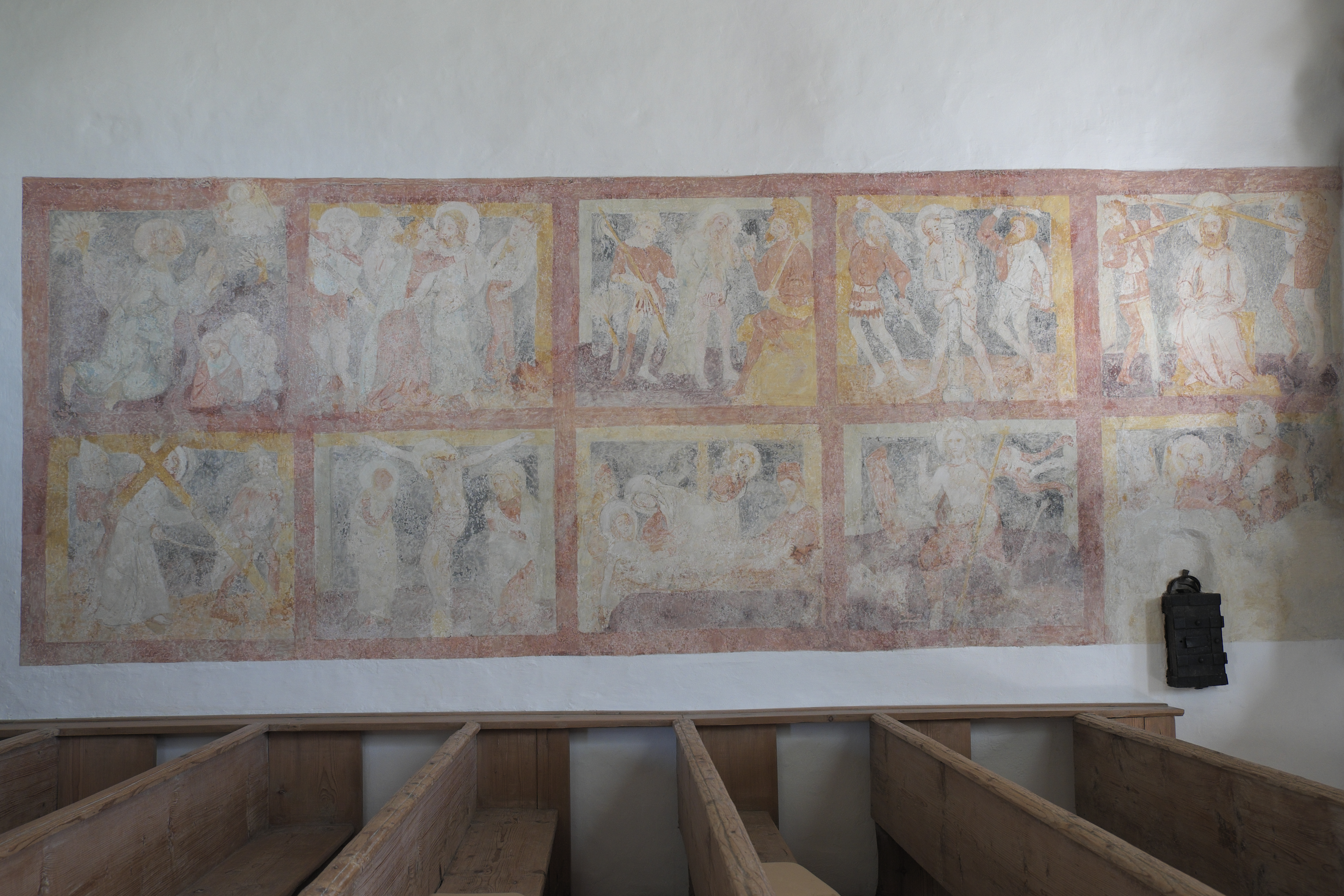 Katholische Filialkirche St. Maria (Maria Himmelfahrt) in Bergkirchen (Jesenwang) im Landkreis Fürstenfeldbruck (Bayern/Deutschland), Fresken aus der Zeit um 1430; Darstellung: Passionsszenen